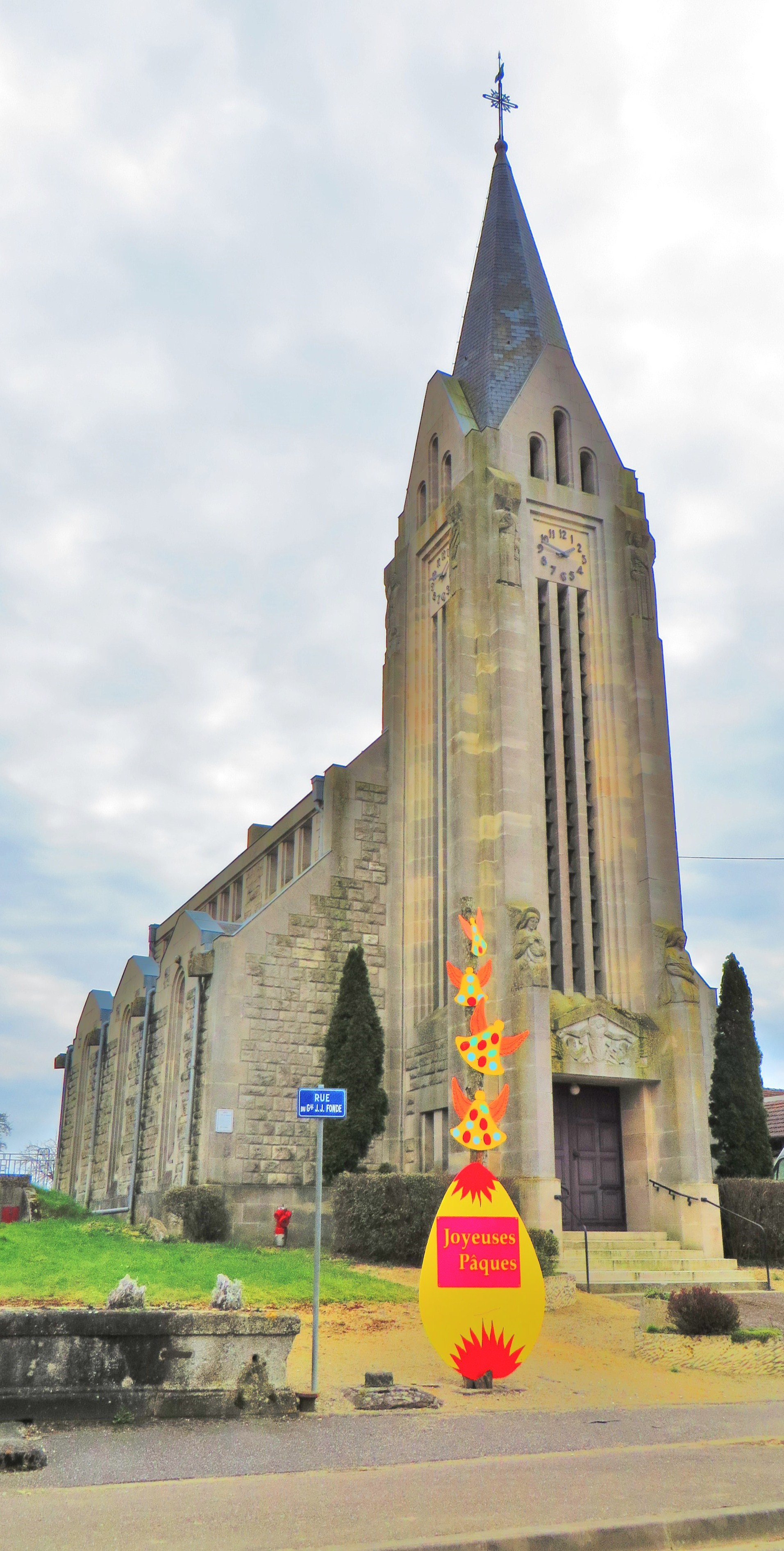 Rambucourt L'église Saint-Martin